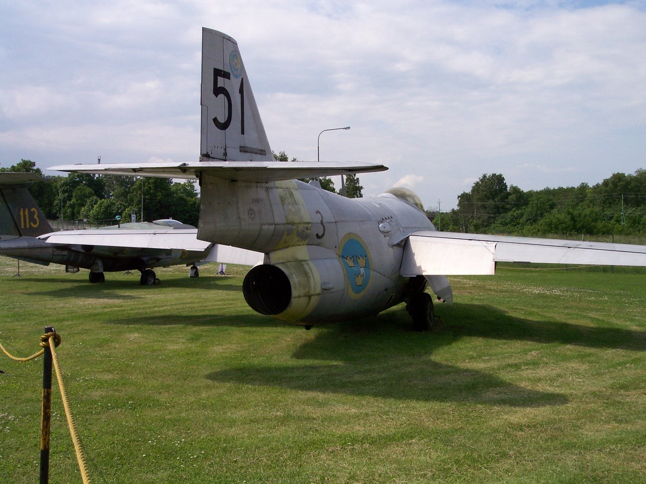 Saab J 29F Tunnan vid Flygvapenmuseum. Flygplansindividen är ursprungligen en Saab J 29B, och levererades den 18 augusti 1954 till F 3. Den 4 oktober 1954 överlämnades individen till FCS. Den 17 augusti 1955 överlämnades den till CVV för modifiering till J 29E. Den 1 oktober 1956 togs den in på Saab för modifiering till J 29F. Den 10 juni 1959 överfördes individen till F 16. Under 1964 märktes den om till 20-15. Den 13 juni 1968 överfördes individen till F 3, där den fick märkningen 3-51, och modifierades för målbogsering. Den 20 december 1974 kasserades individen i komplett skick, och överlämnades till Flygvapenmuseum.